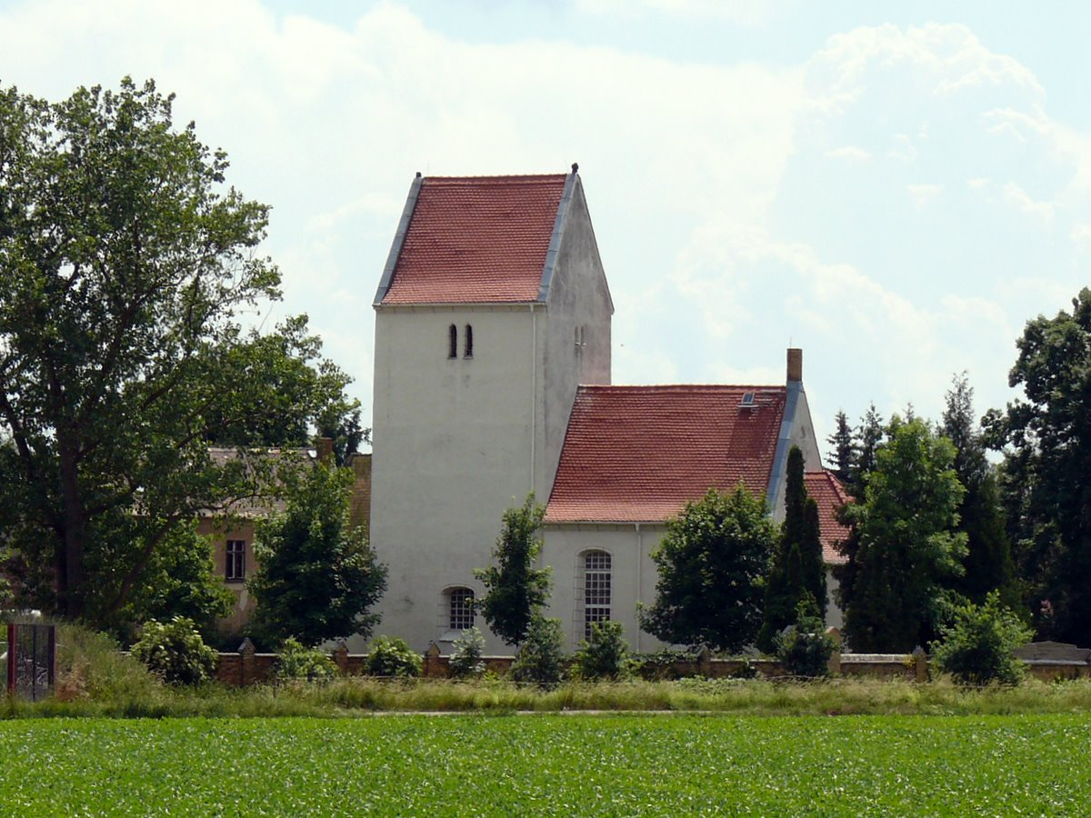 Die Dorfkirche in Leipzig-Hirschfeld.